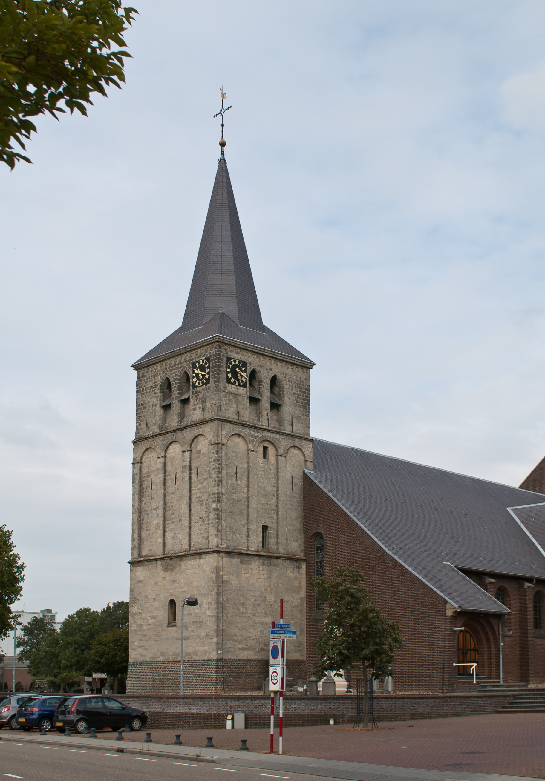 Sint Getrudiskerktoren, Maasbracht, 14. Euw